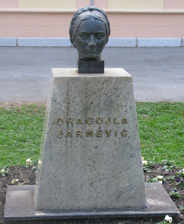 Dragojla Jarnević, Karlovac